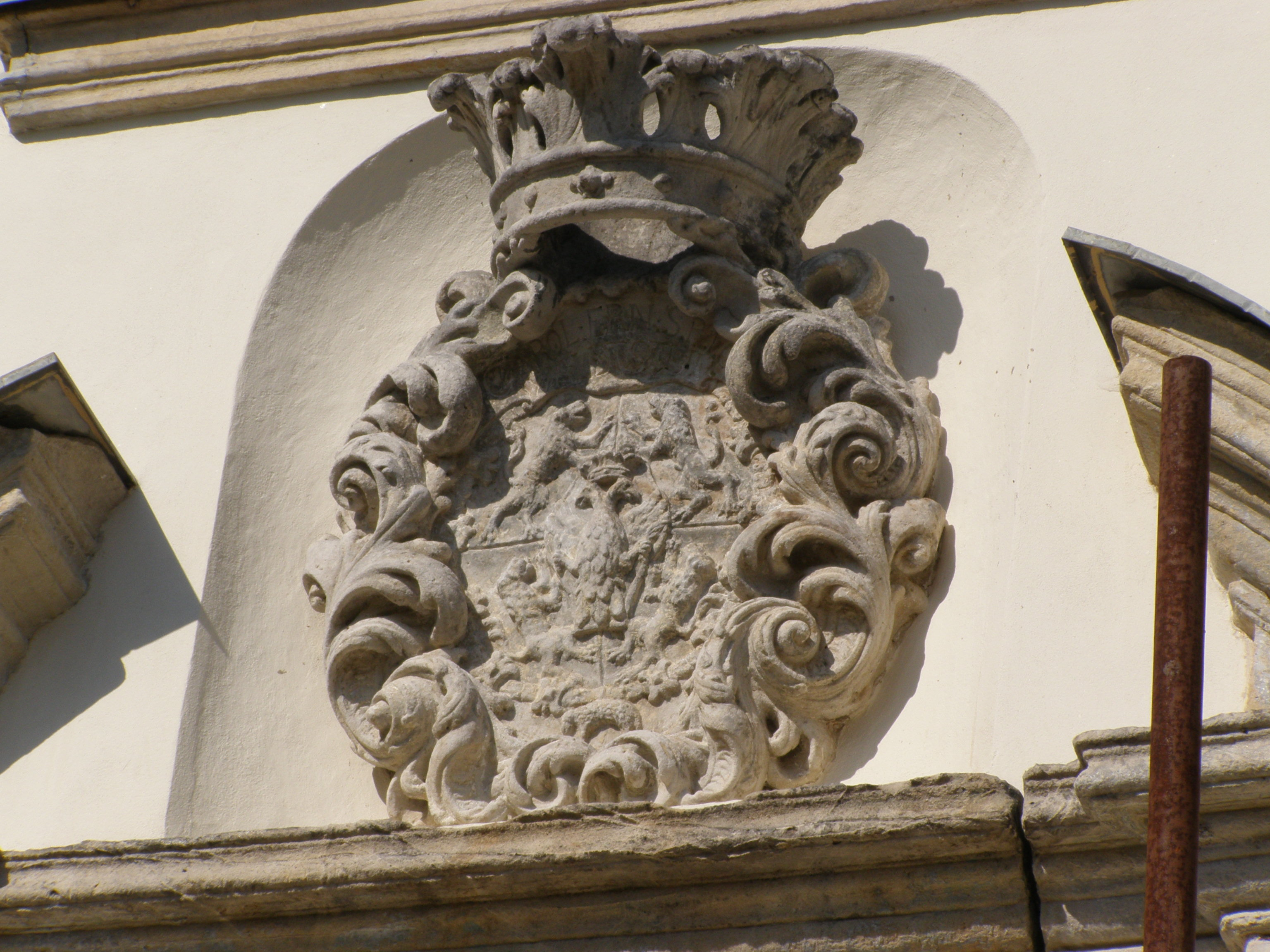 Kostel sv. Václava (Rychnov u Jablonce nad Nisou). Valdštejnský erb. Mezi hodnostní korunkou a štítem nápis CAROL: ERN: S. R. I. C[?] / WALDSTEIN. Patřil Karlu Arnoštovi (1661-1713), rytíři Řádu zlatého rouna.